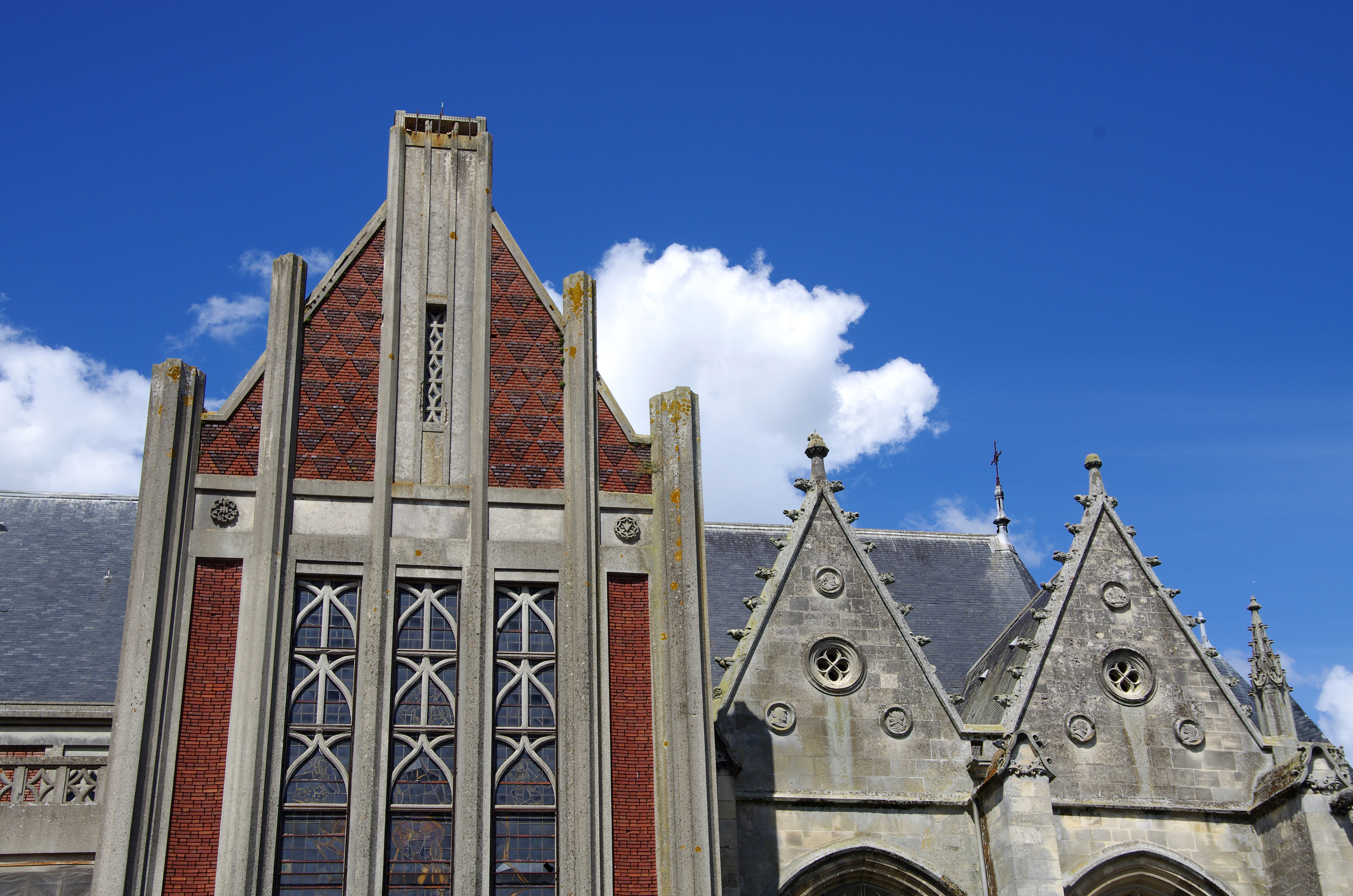 Roye (Somme, France) - L'église Saint-Pierre. .